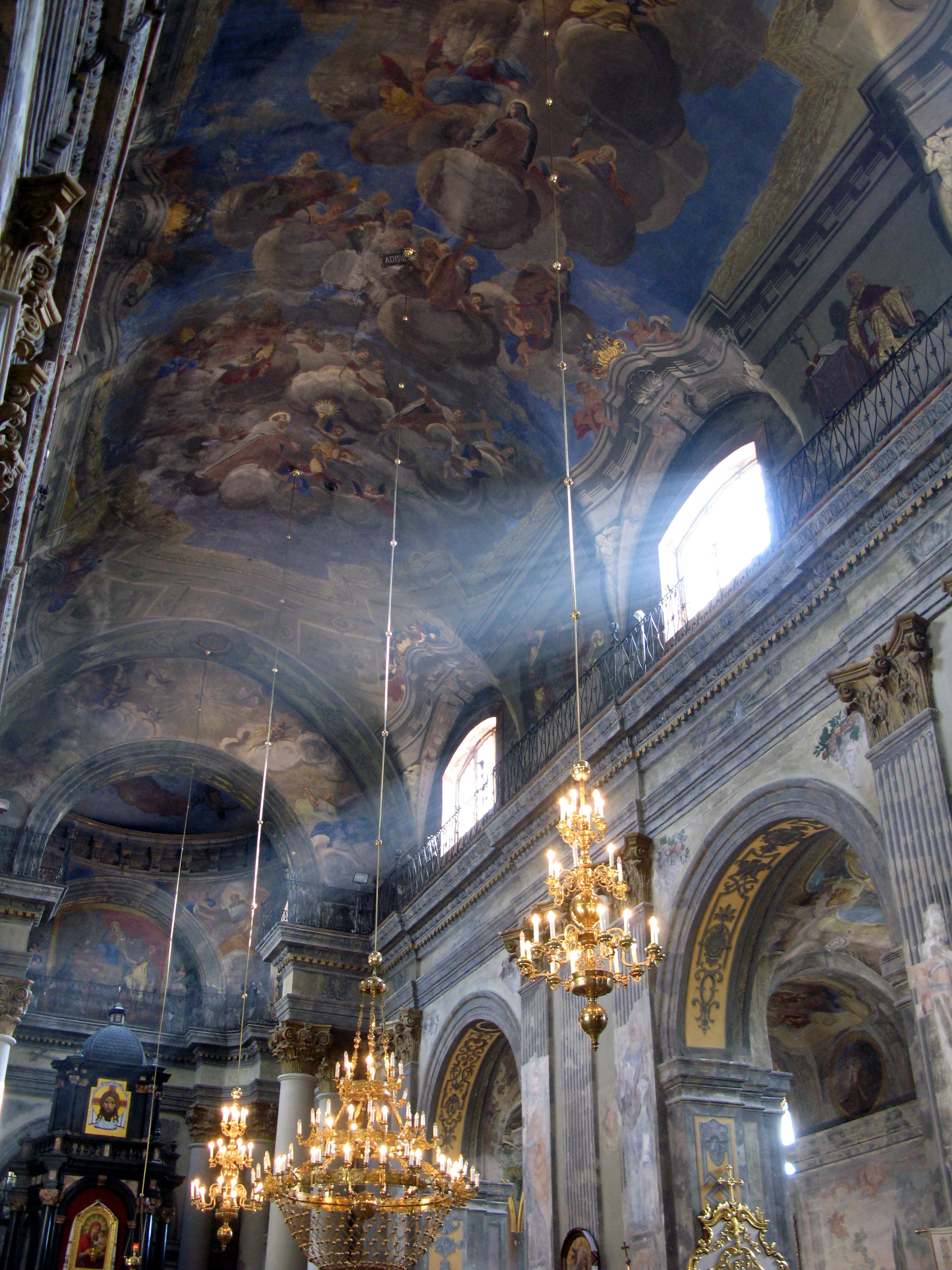 Церква св. Михайла, Львів, Винниченка вул., 22